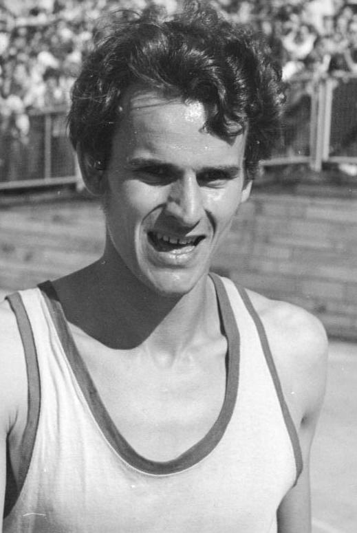 Jürgen Straub ADN-ZB Kluge 28.5.78 Erfurt: Klubpokal-Vorrunde der DDR-Leichtathleten in Erfurt - Über 1500 m der Männer erzielte Jürgen Straub (ASK Vorwärts Potsdam - unser Bild von einem früheren Wettkampf) mit 3:36,1 min einen neuen DDR-Rekord, womit er seine eigene Bisherige Rekordzeit um 1,4 s verbesserte.